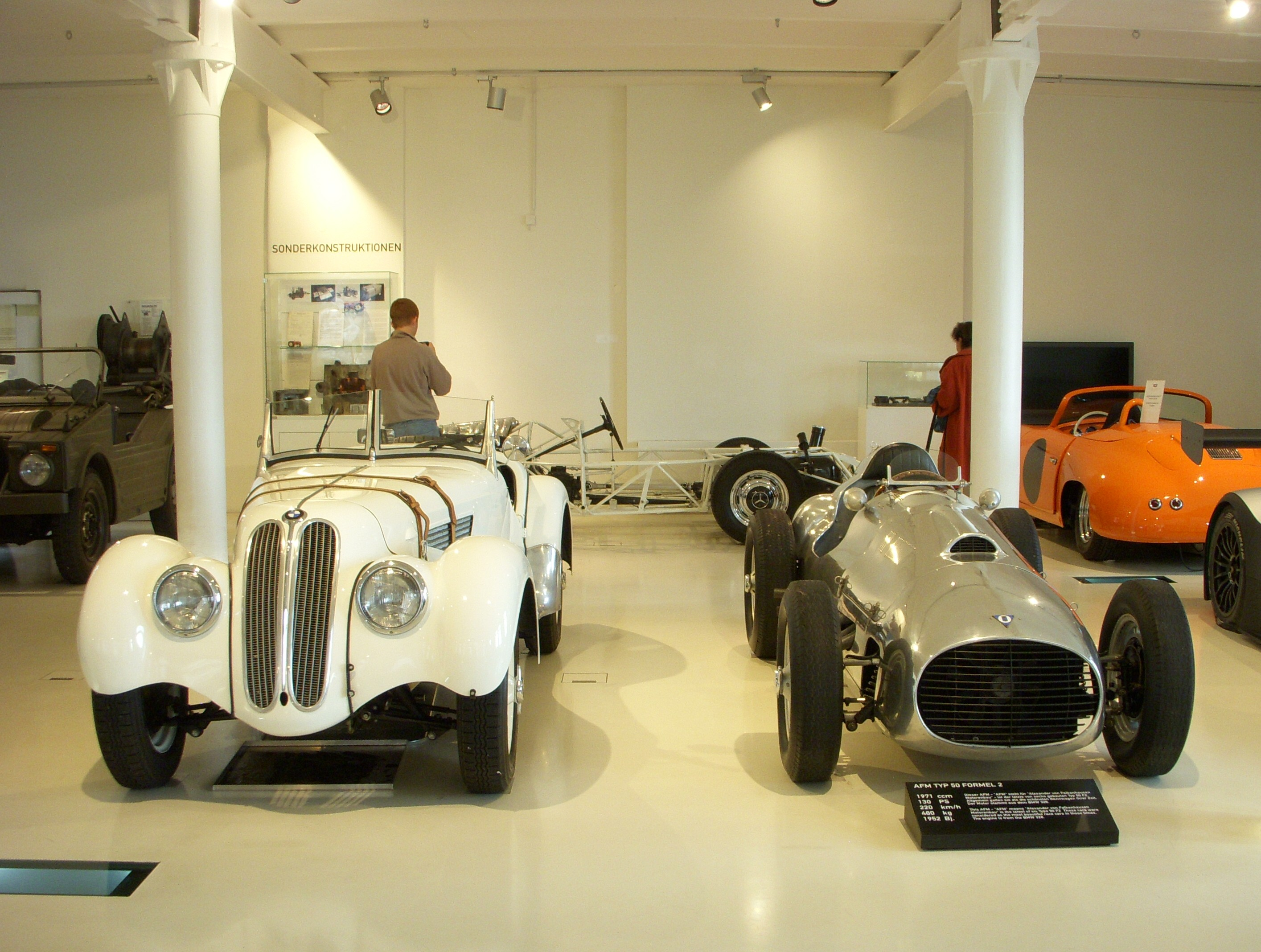 Prototyp Museum in Hamburg